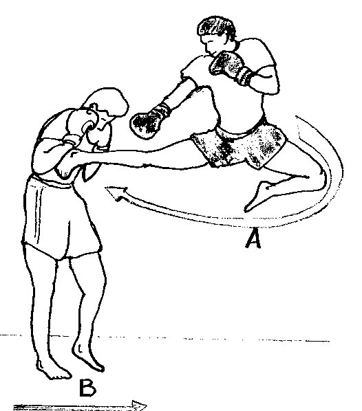 spinning_side1.jpg